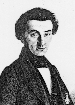 Bild von Heinrich Ferdinand Scherk